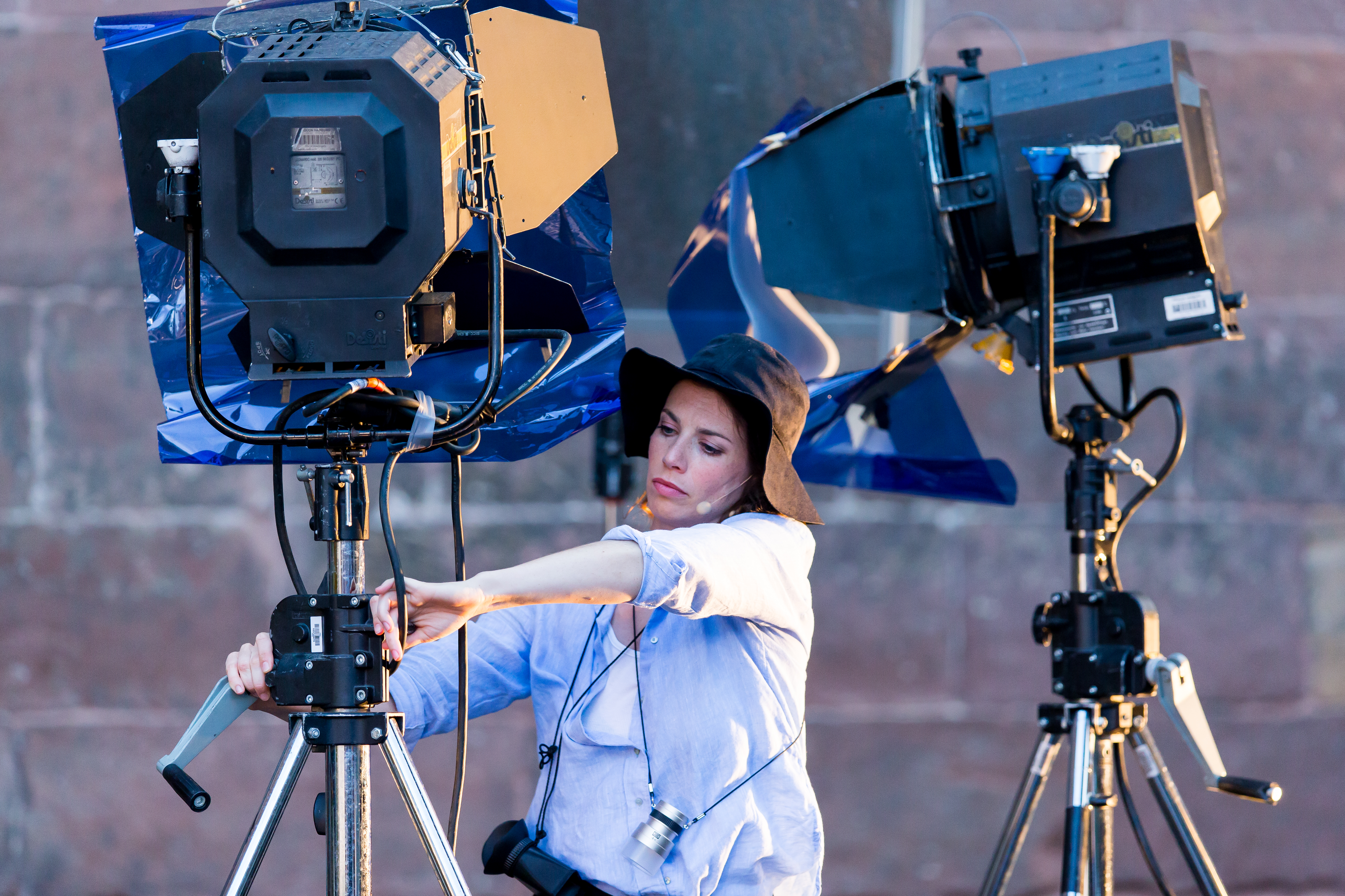 2016: Uraufführung: "GOLD. Der Film der Nibelungen" Regie: Nuran David Calis Autor: Albert Ostermaier Intendant: Nico Hofmann --- Ensemble: Produzent Konstantin Trauer: Uwe Ochsenknecht Regisseur Arsenij Kubik: Vladimir Burlakov Drehbuchautor Charlie P. Weide: Josef Ostendorf Society Reporter Peter Scheumer: Dominic Raacke Kamerafrau "the eye": Anna Rot Setdesignerin "set": Joy Maria Bai Assistentin des Produzenten Carmen: Alexandra Kamp Maskenbildnerin Sueyla Blume : Ayse Bosse die Ältere Kriemhild Karina Bergmann: Katja Weitzenböck die Jüngere Kriemhild Simone Gehel: Constanze Wächter die Ältere Brünhild Lotte Jünger: Michaela Steiger die Jüngere Brünhild Nathalie Aurun: Dennenesch Zoudé Siegfried Mohamad Söder: Ismail Deniz Hagen René Inner: Sascha Göpel Gunther Klaus Castel: Maximilian Laprell Bürgermeister Franz Koppoler: Heiner Lauterbach during Nibelungenfestspiele "GOLD. Der Film der Nibelungen" at Wormser Kaiserdom, Worms, Rheinland Pfalz, Germany on 2016-07-12, Photo: Sven Mandel